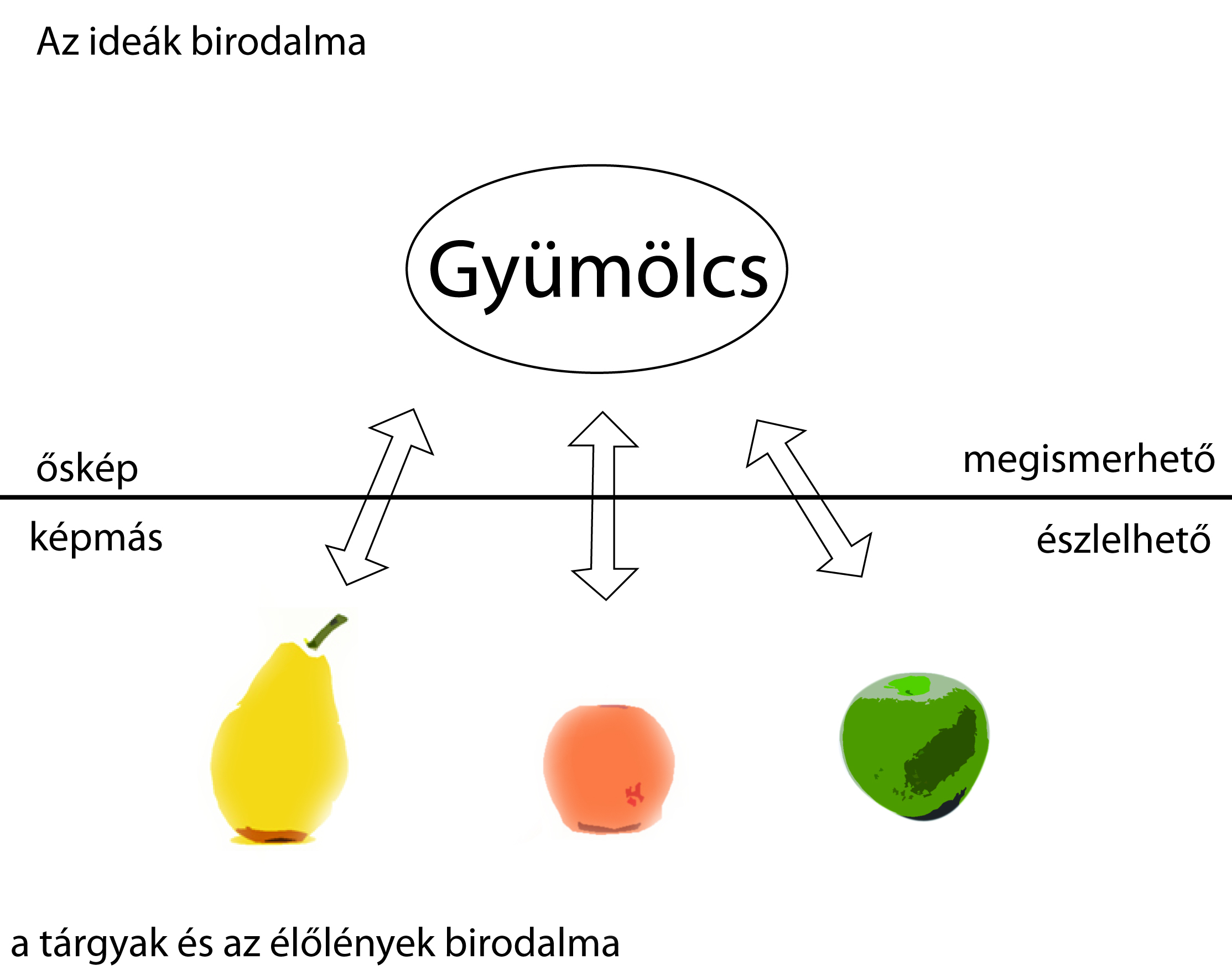 Platón kétvilág tana